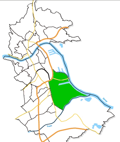 Städtische Bezirke Linz - St. Peter hervorgehoben. Selbst gezeichnet auf Grundlage von: "Stadtforschung Linz: Linz 2000. Fakten, Bilder, Grafiken." (der greg:) 12.3.2006 - Lizenz: CC-BY 2.0